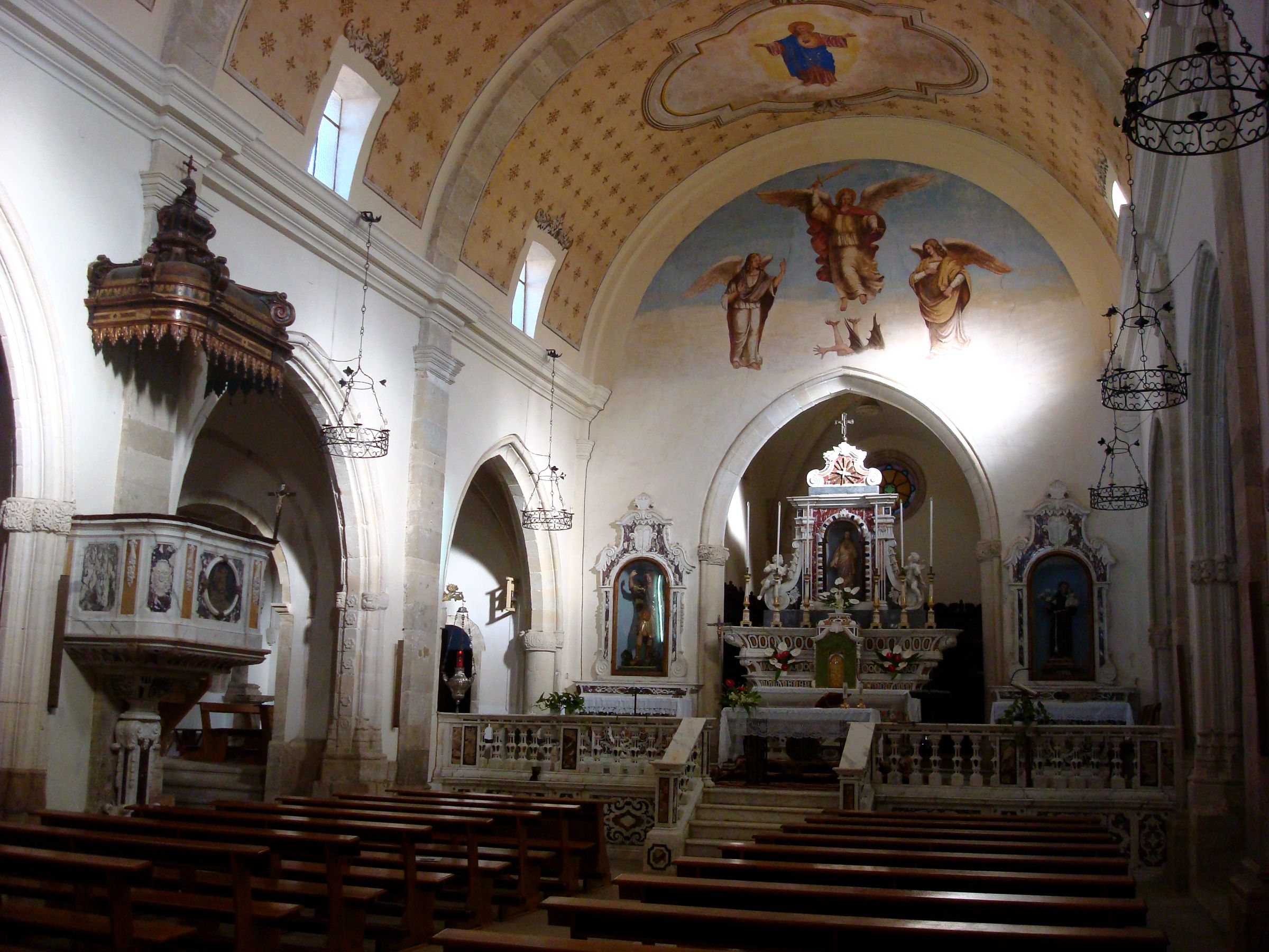 Interno della chiesa parrocchiale di San Michele Arcangelo a Collinas.